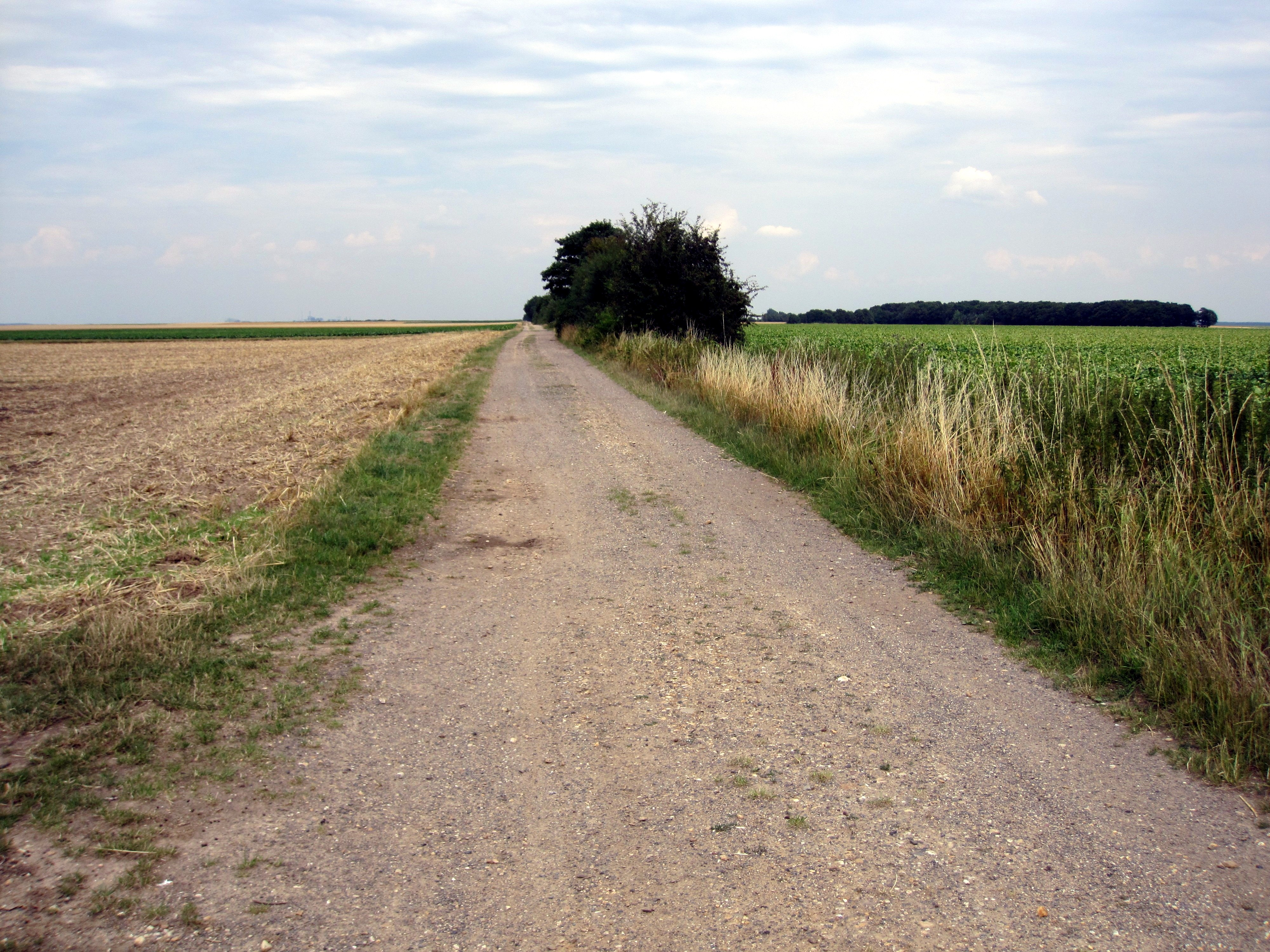 Teilstück der ehemaligen Römerstraße Köln- Zülpich zwischen Erp und Friesheim